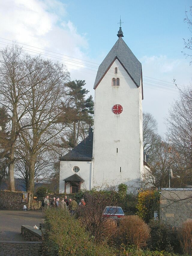 Kirche in Bärstadt vom Lindenplatz aus